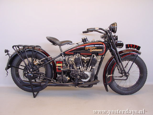 Harley-Davidson 27 J 1927.